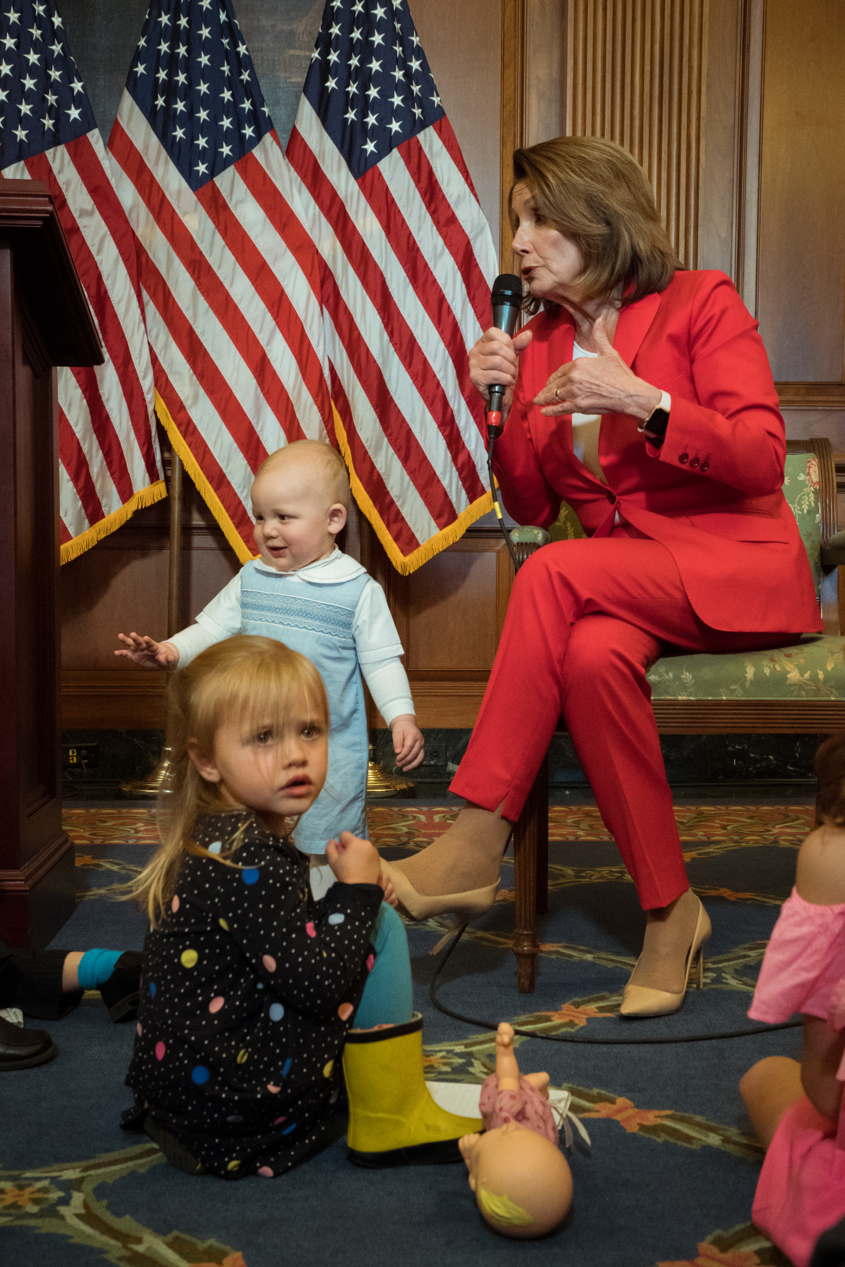 By Julio Obscura